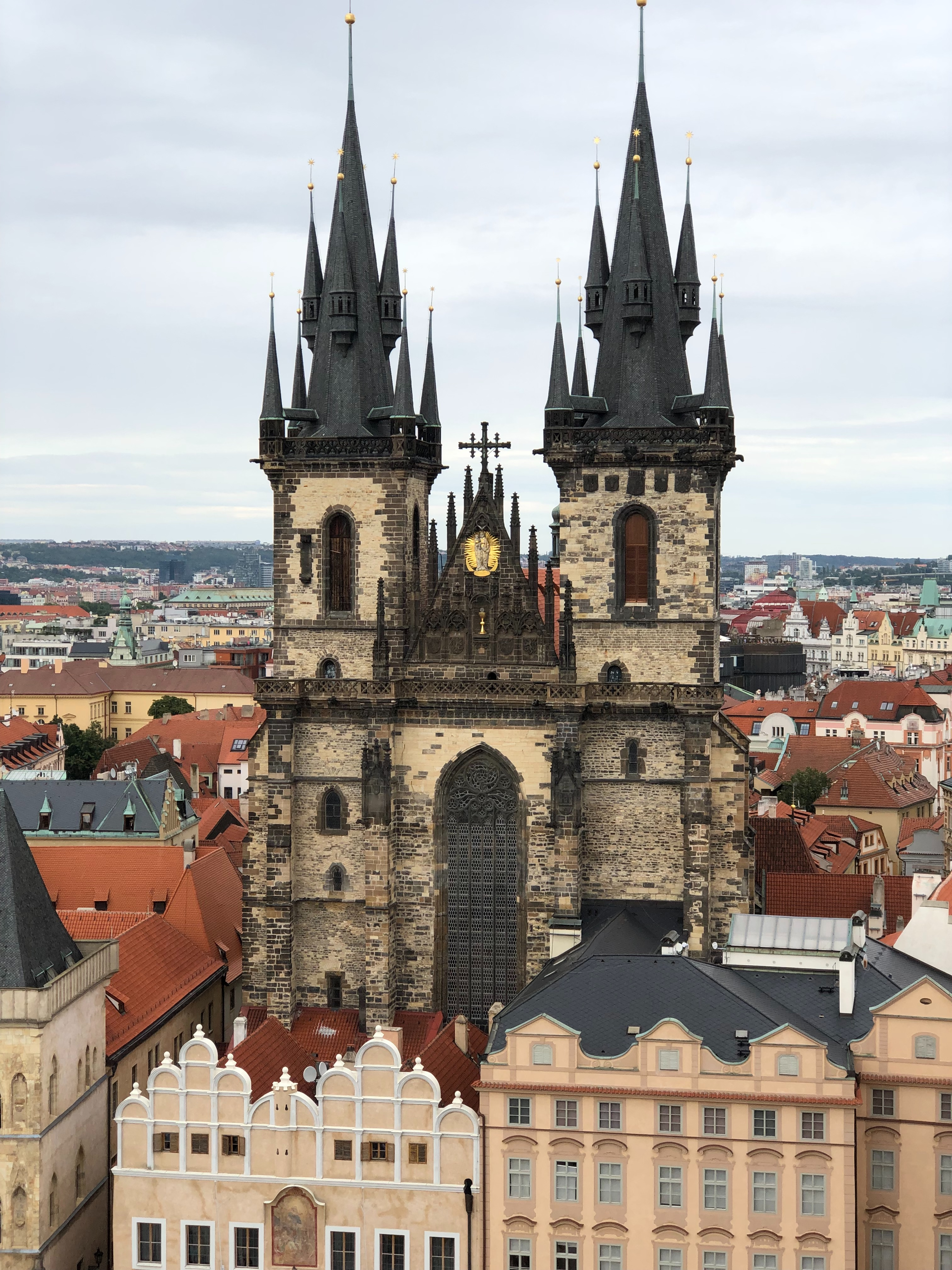 Stadhuis van Praag, Praag, Tsjechië, August 2019